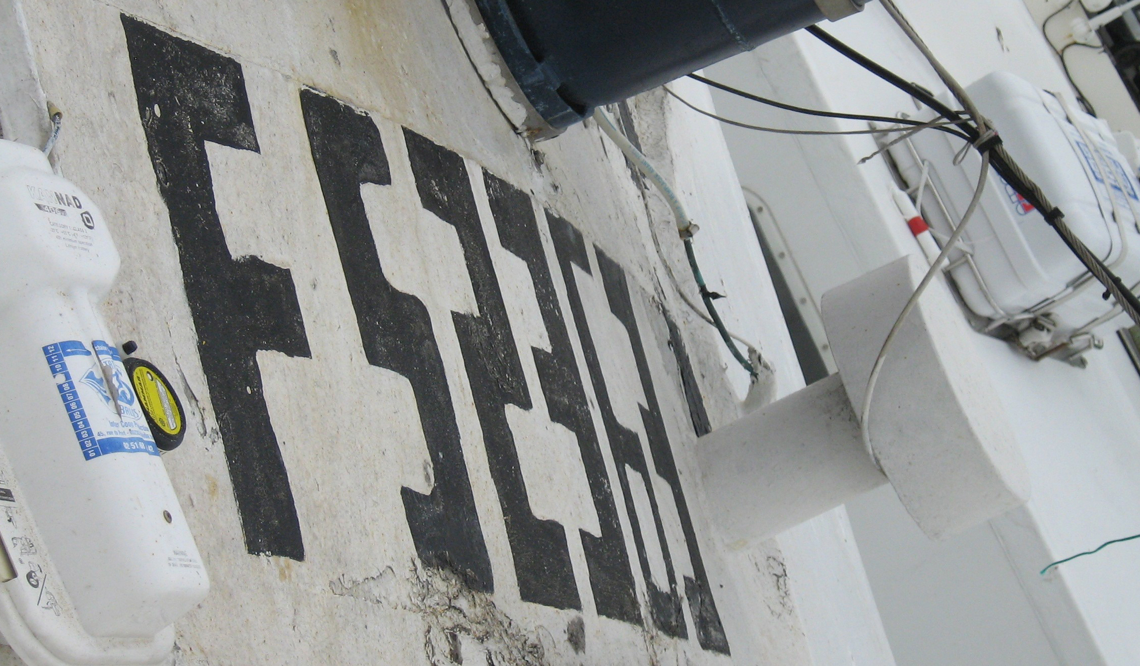 L'indicatif radio est attribué à la coque du navire. Formes des indicatifs Pays + types (navire ou aéronef en fonction du nombre de caractères). ici du navire Français équipé en bande marine VHF. Navires de pêche. L'indicatif radio doit être peint sur le toit de la timonerie, quand elle existe, de telle manière qu'il puisse être visible par un avion suivant une route parallèle à celle du navire et de même sens. La couleur des lettres et des chiffres doit être noire sur fond blanc, ou blanche sur fond noir. Pour les navires d'une longueur inférieure ou égale à 10 mètres, la taille des lettres et des chiffres est fonction de la place disponible sur le toit de la timonerie ; Pour les navires d'une longueur supérieure à 10 mètres mais inférieure ou égale à 17 mètres, les lettres et les chiffres doivent avoir au moins 25 cm de hauteur et 4 cm de largeur de trait. Pour les navires d'une longueur supérieure à 17 mètres, les lettres et les chiffres doivent avoir au moins 45 cm de hauteur et 6 cm de largeur de trait.